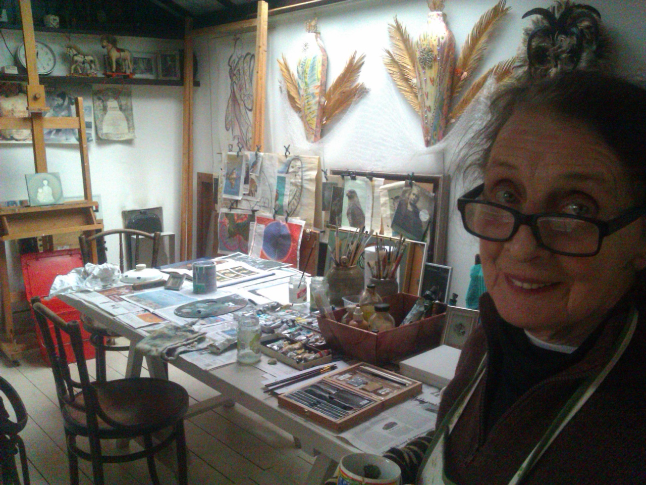 Kunstenares Marie Troost